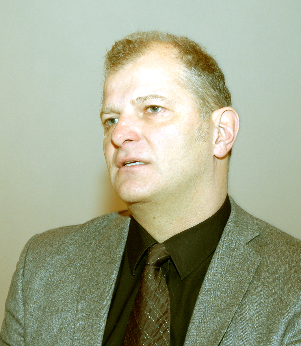 Martin Kušej, Intendant des Residenztheaters München, 2014